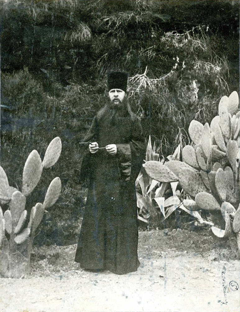 архимандрит Сергий в Афинах 1890-е